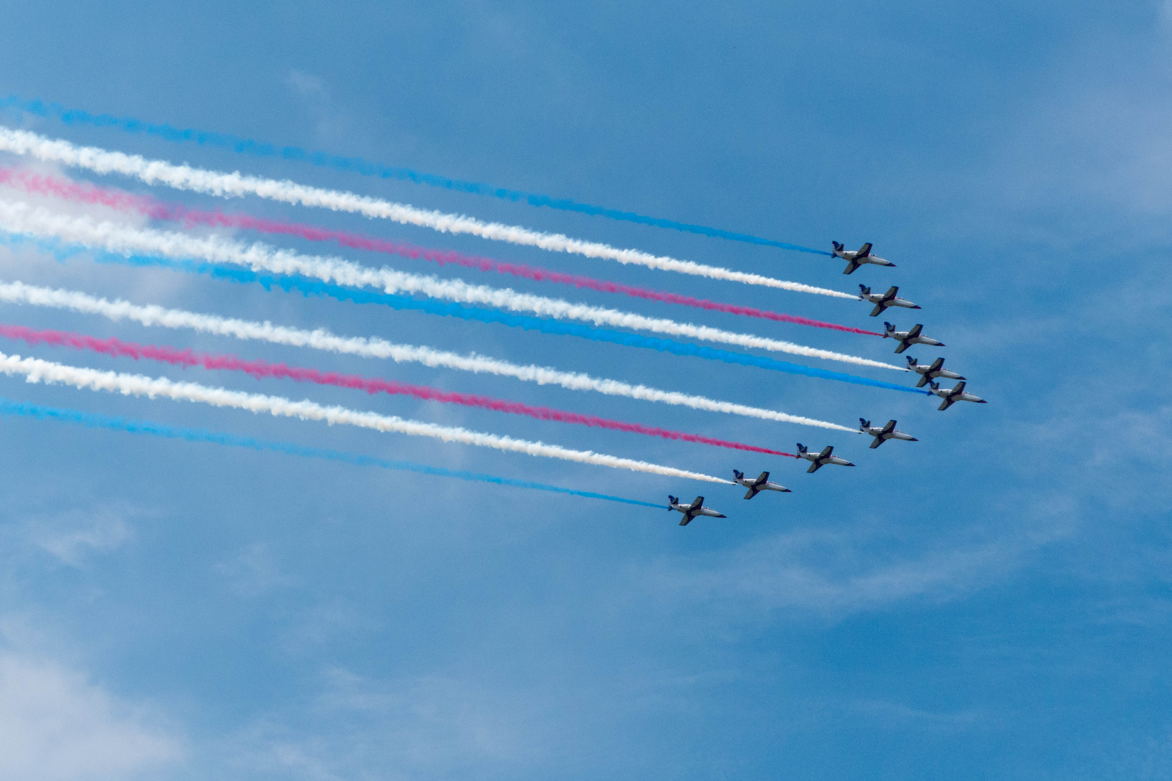 2014年陸軍官校營區開放活動，操場上空的空軍雷虎小組九機V字編隊。